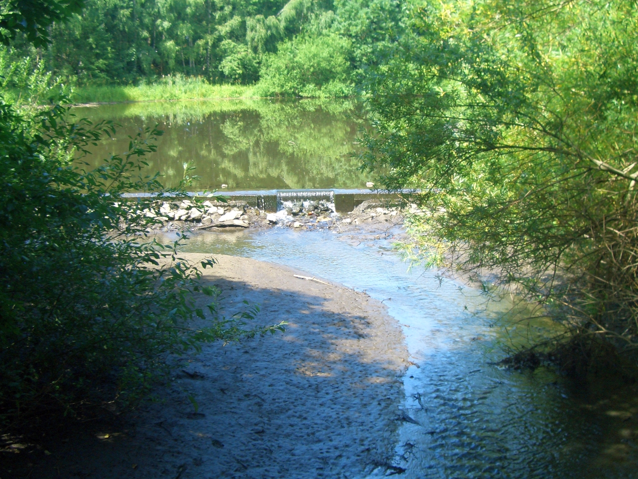 Ablauf aus der teichartigen eerweiterung des Fuhsekanals zur Oker über einen Damm (bei Niedrigwasser)